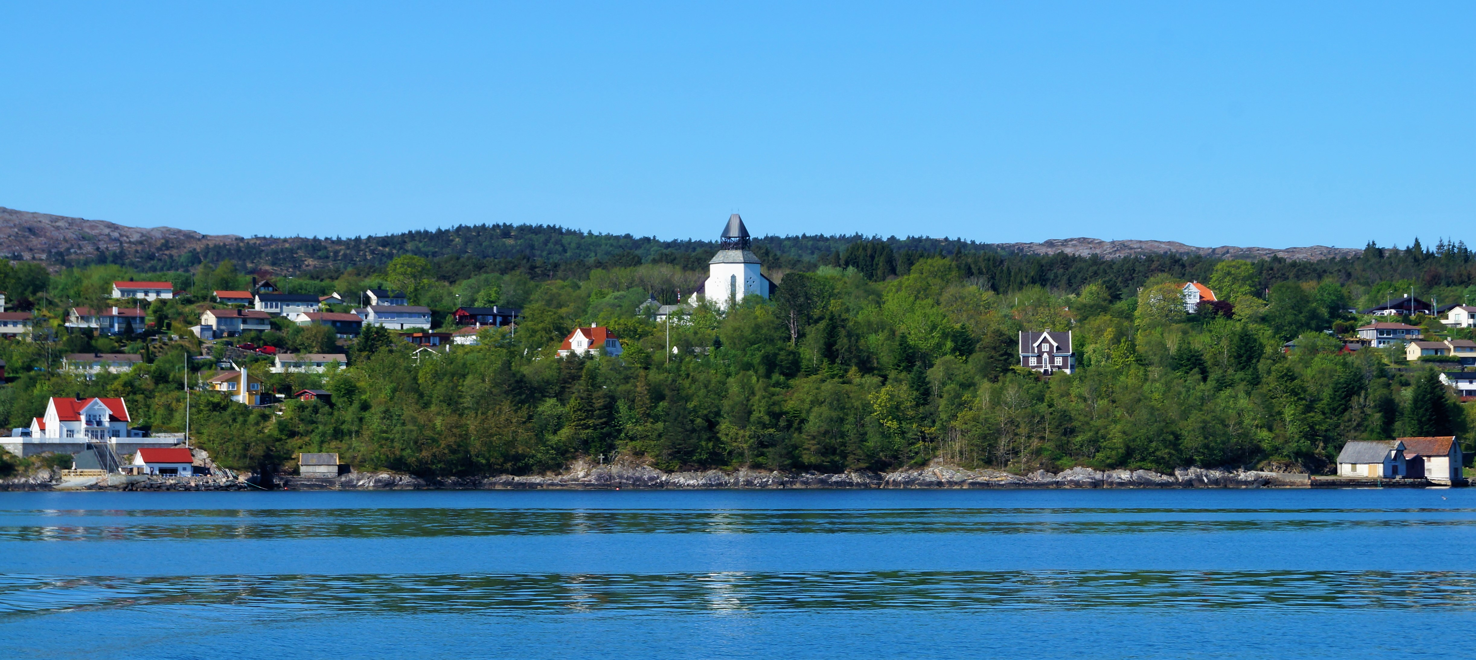 Sund kirke sett fra sjøen